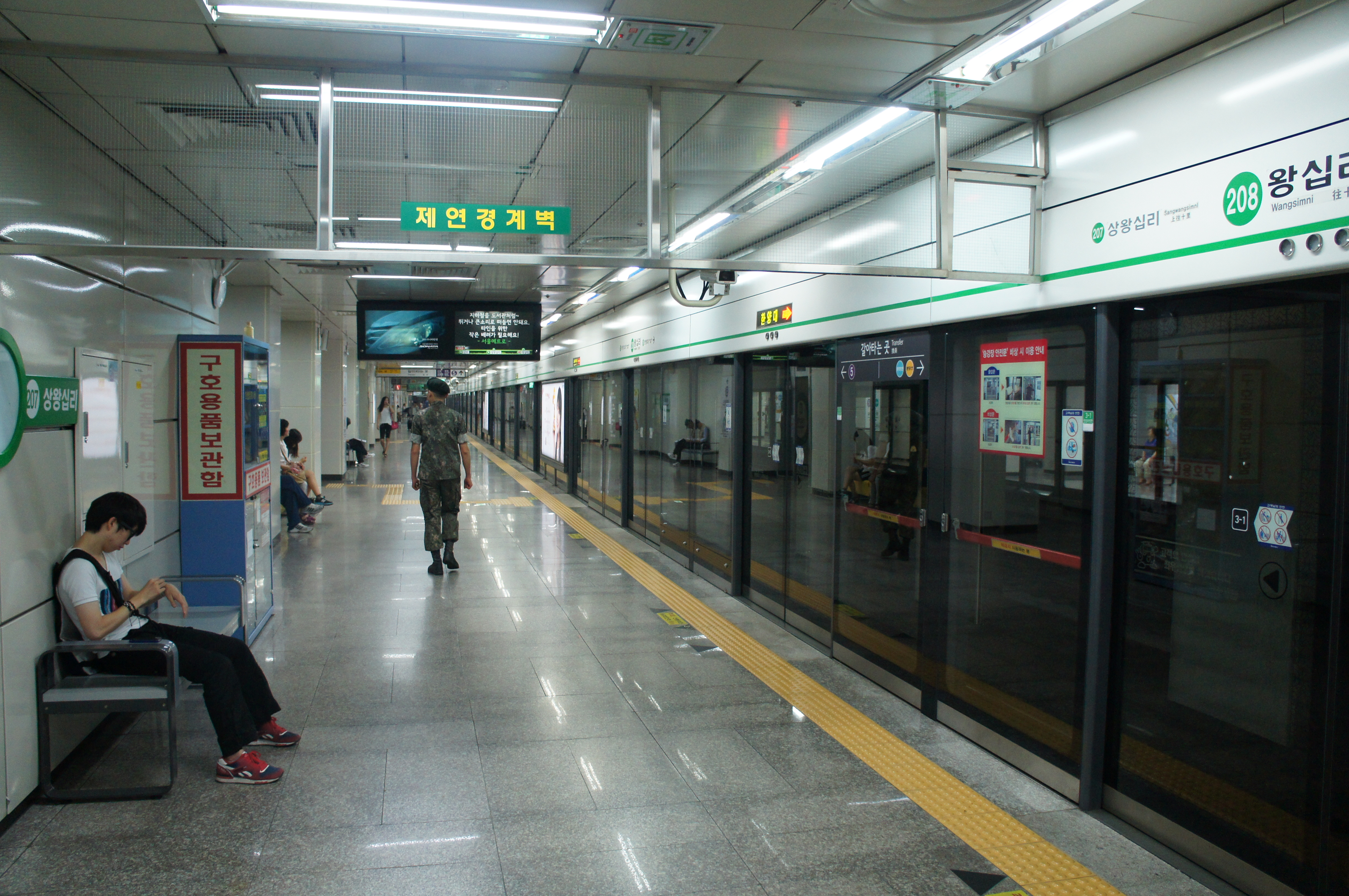 왕십리역 2호선 승강장